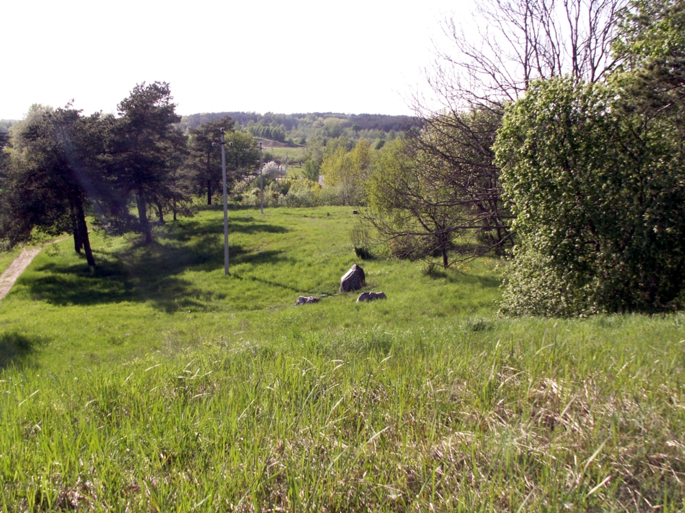 Aleksandrija. Šiaulių gegužinių vieta